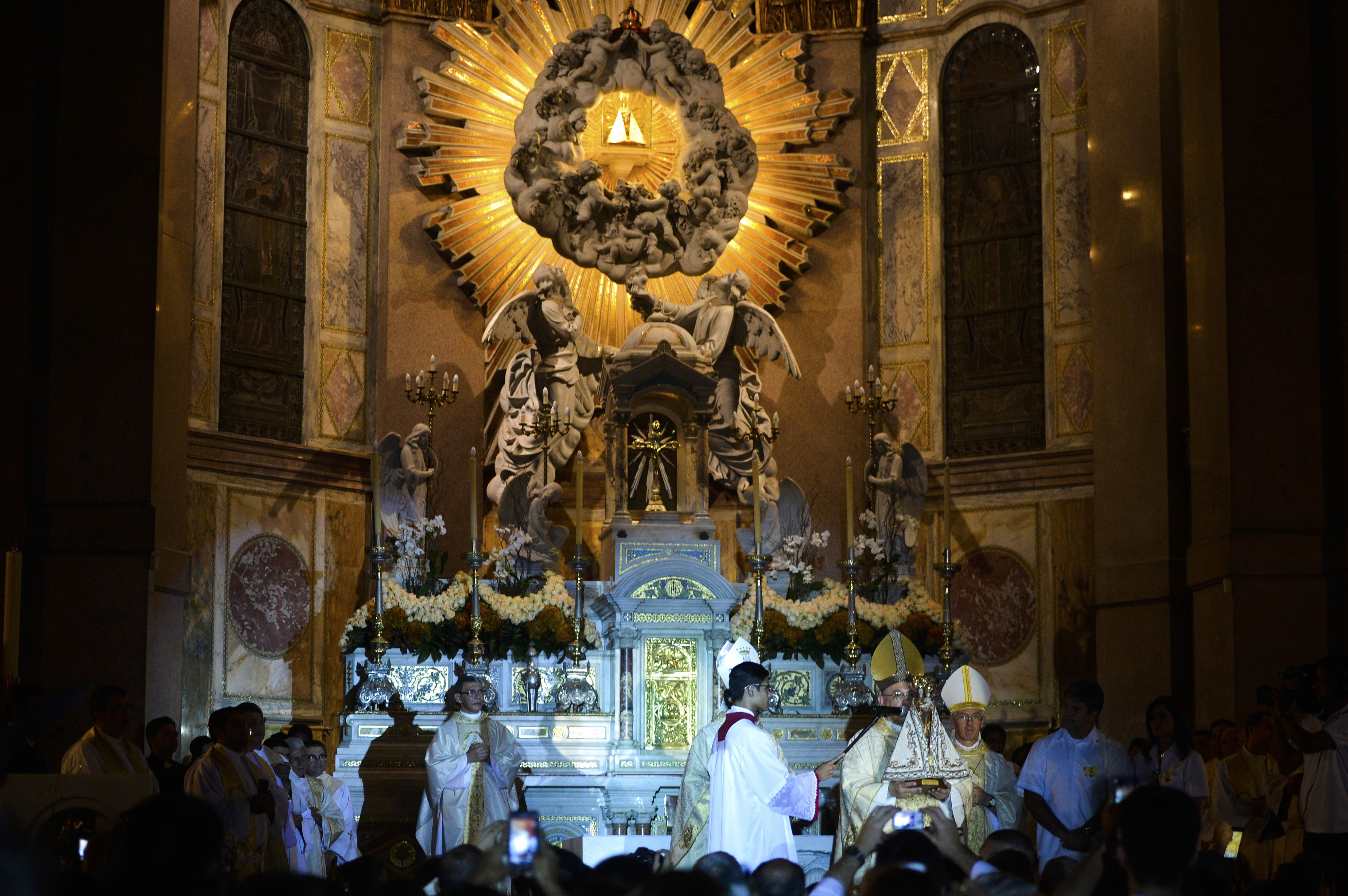 Missa e apresentação do manto de Nossa Senhora de Nazaré